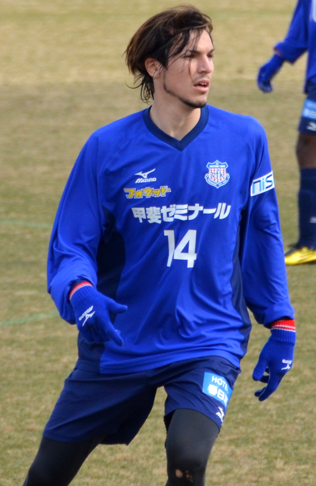 Mike HAVENAAR